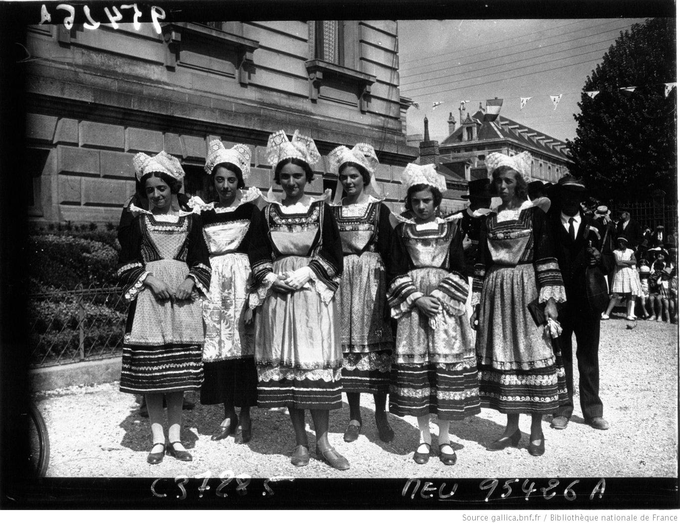 Visite du président de la République Edouard Herriot en août 1932 pour célébrer le 400ème anniversaire de l'union de la Bretagne à la France.